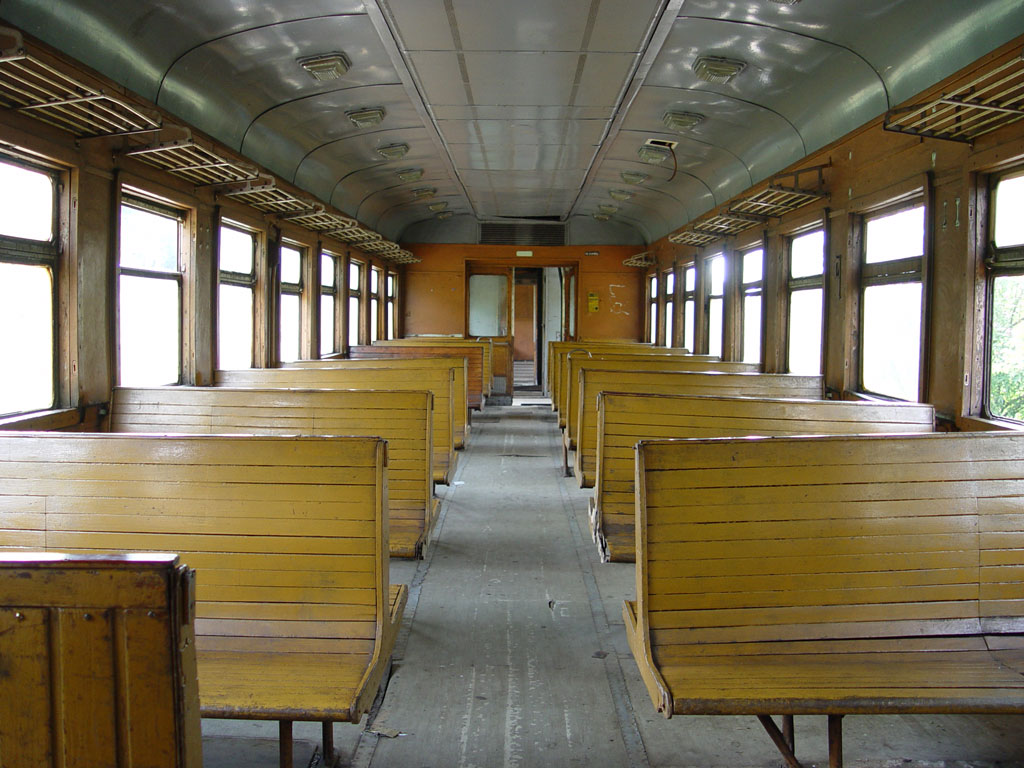 Салон электропоезда ЭР1-256, такой же был у ранних ЭР2